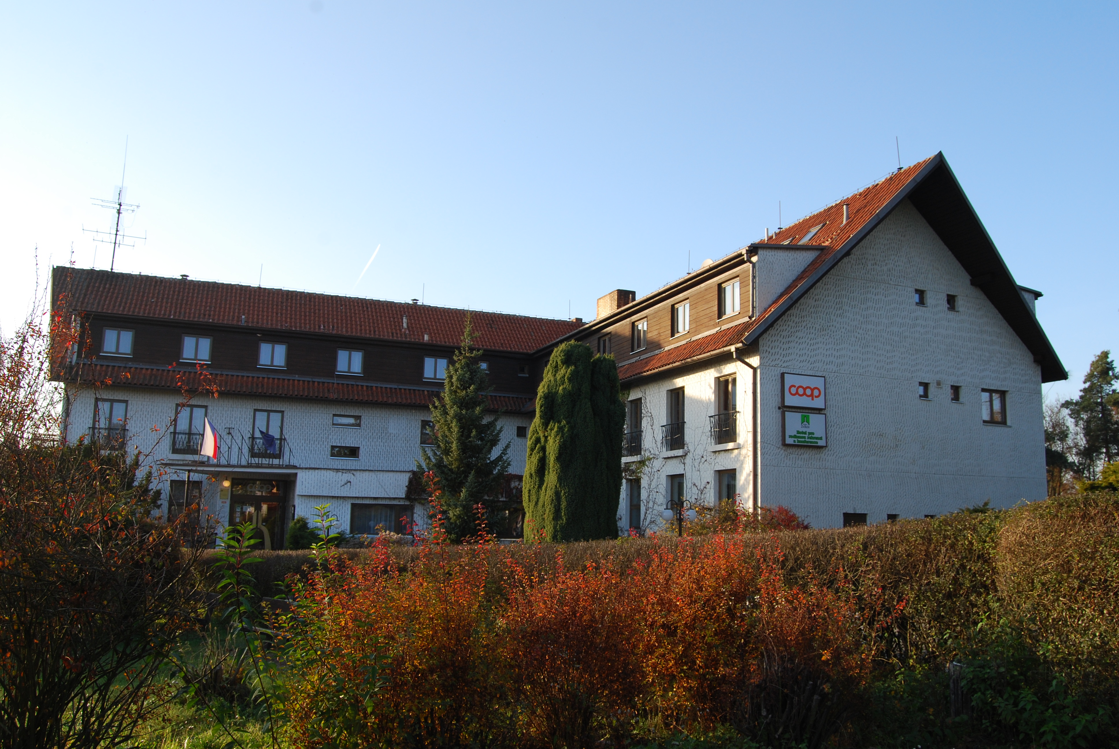 Hotel Zvíkovské Podhradí. Obec Zvíkovské Podhradí. Okres Písek. Česko.